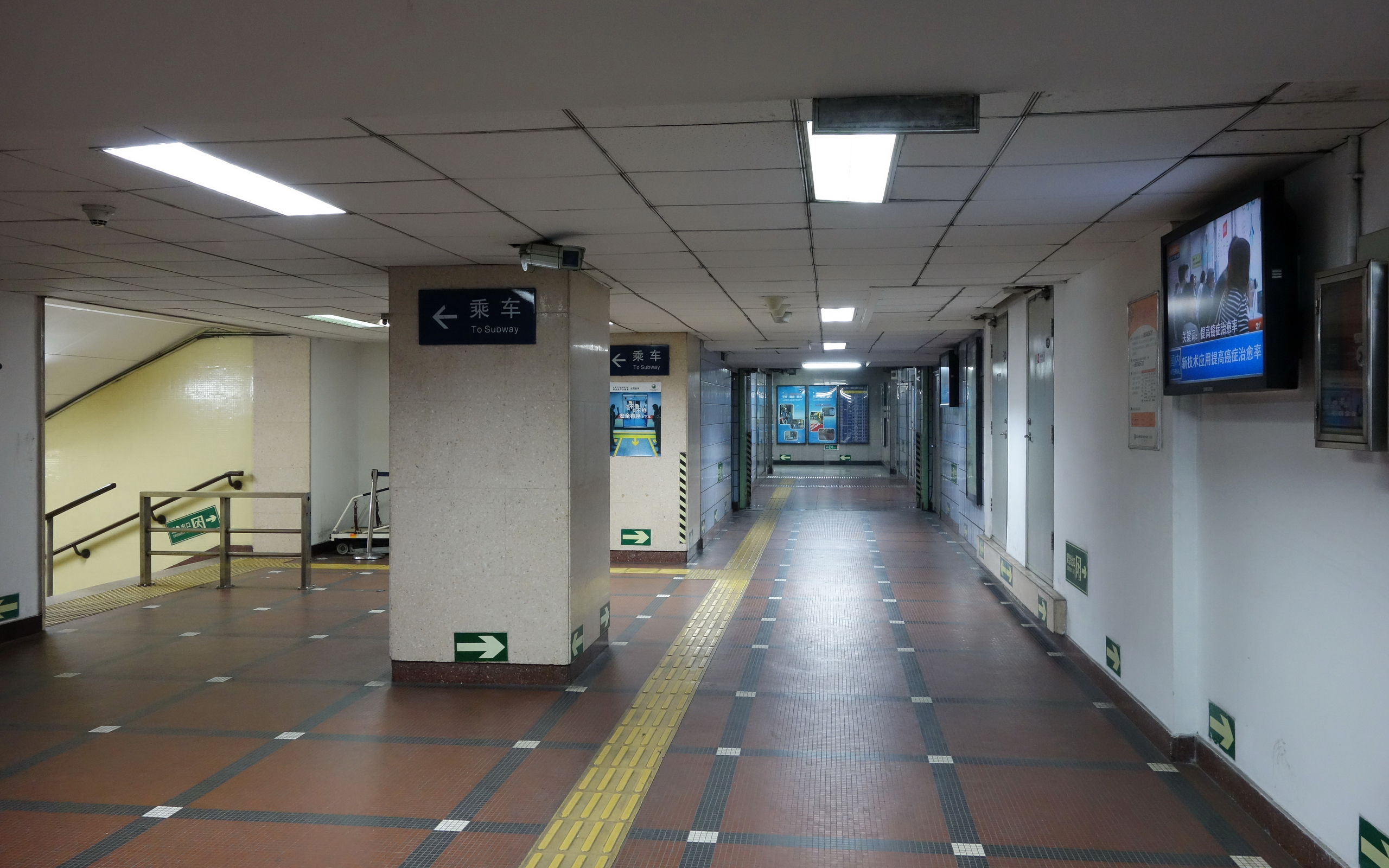 八宝山站进出站通道